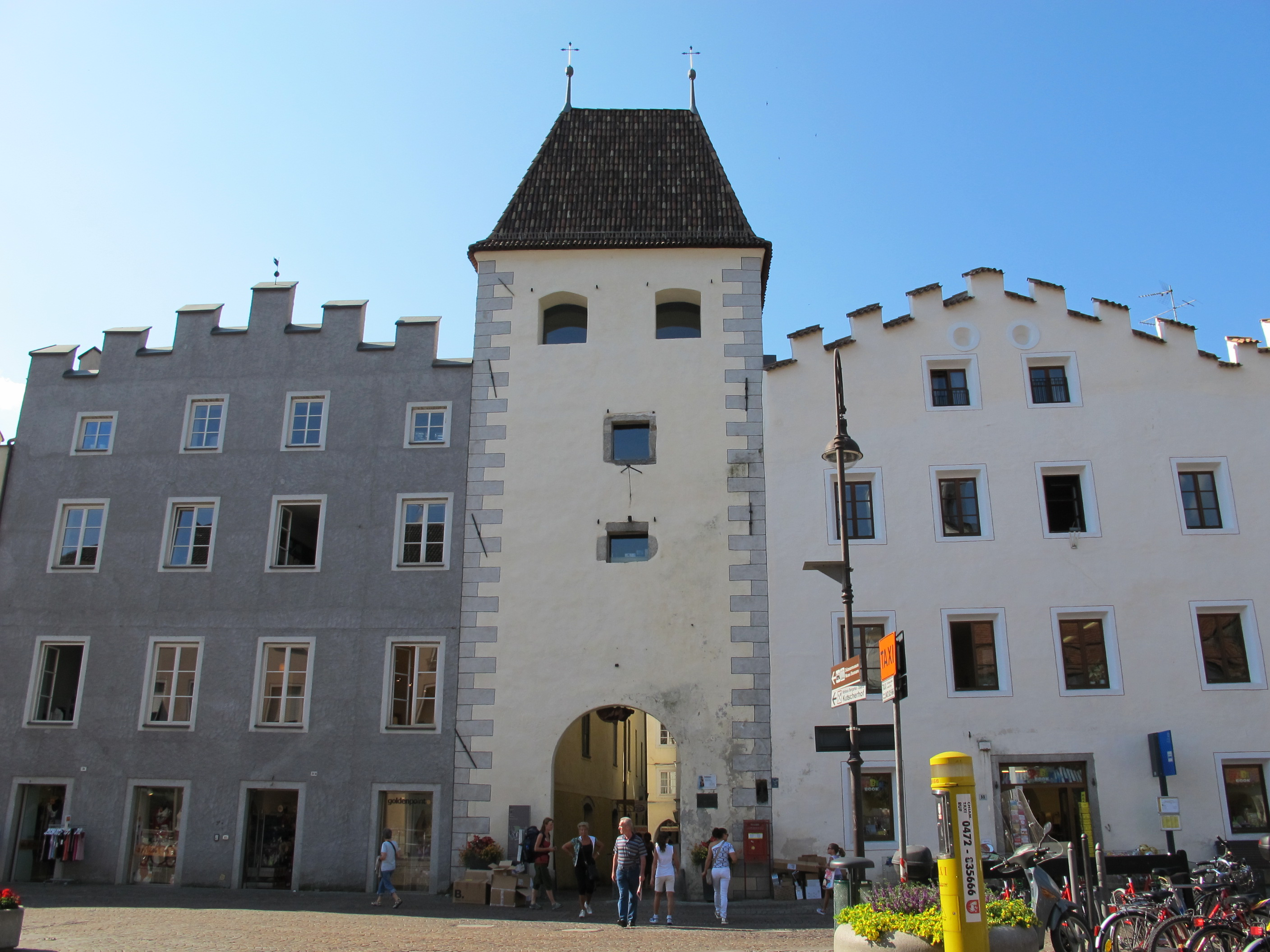 Links das Gebäude Große Lauben 28 - Großer Graben 31, in der Mitte das Säbner Tor, rechts der Ansitz Lachmüller in Brixen